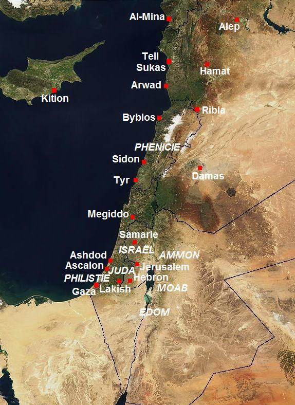 Carte du Levant au Ier millénaire avant J.-C.